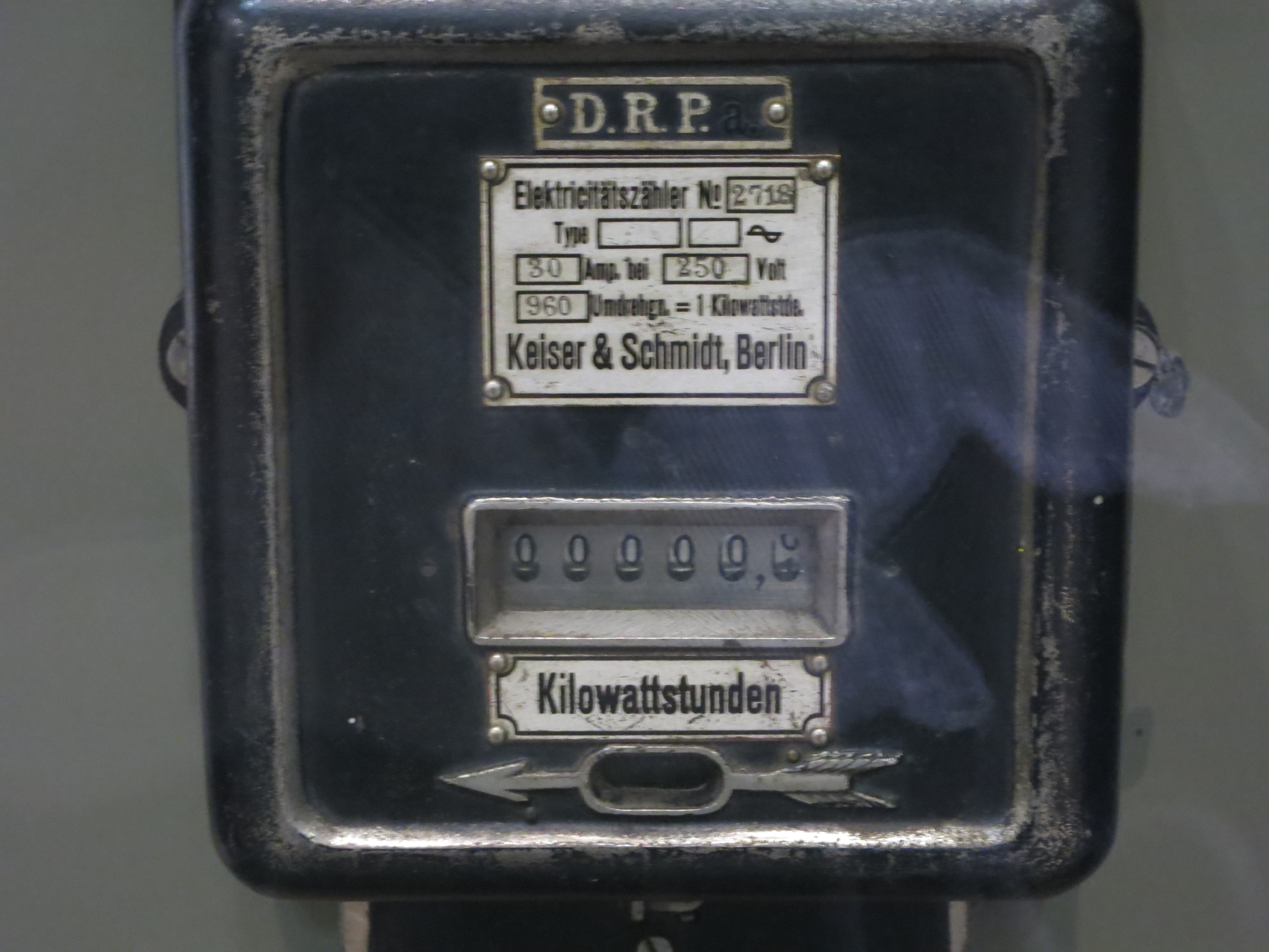 Wechselstromzähler Keiser & Schmidt, 1913